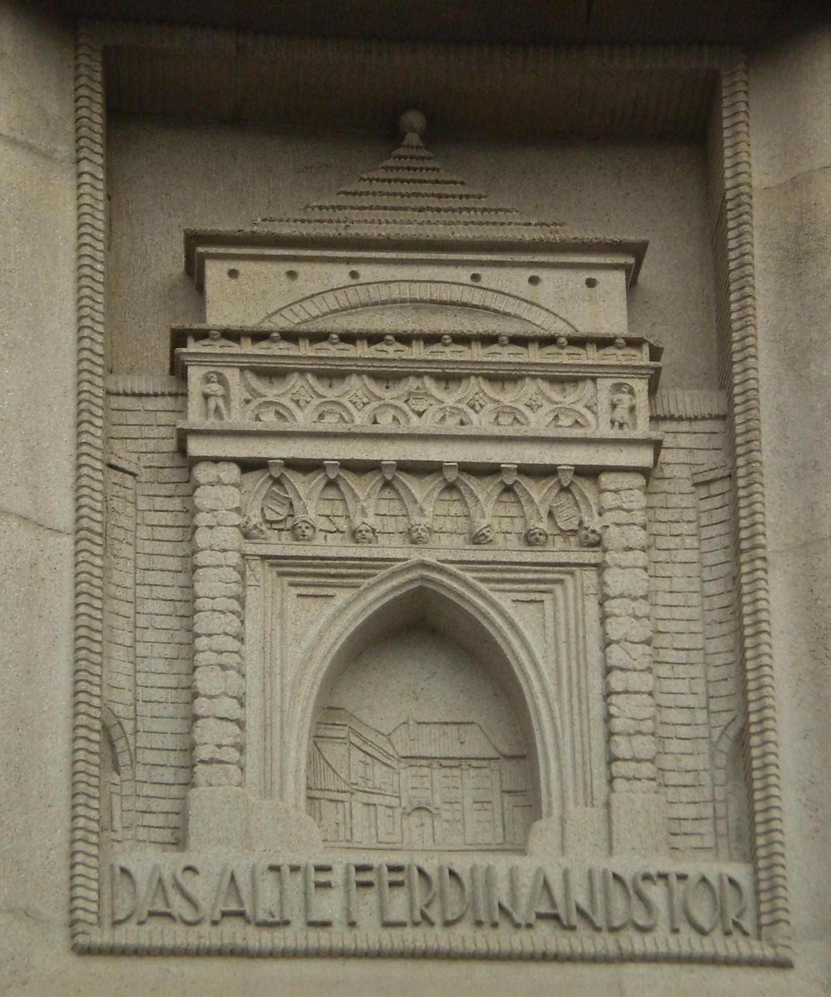 Reliéf v Brně při ústí Masarykovy ulice k vlakovému nádraží, který připomíná městskou bránu.